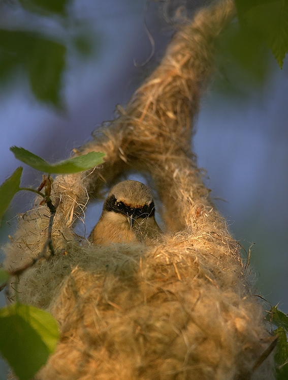 Remiz pendulinus - male on nest, Olomoucko, CZ